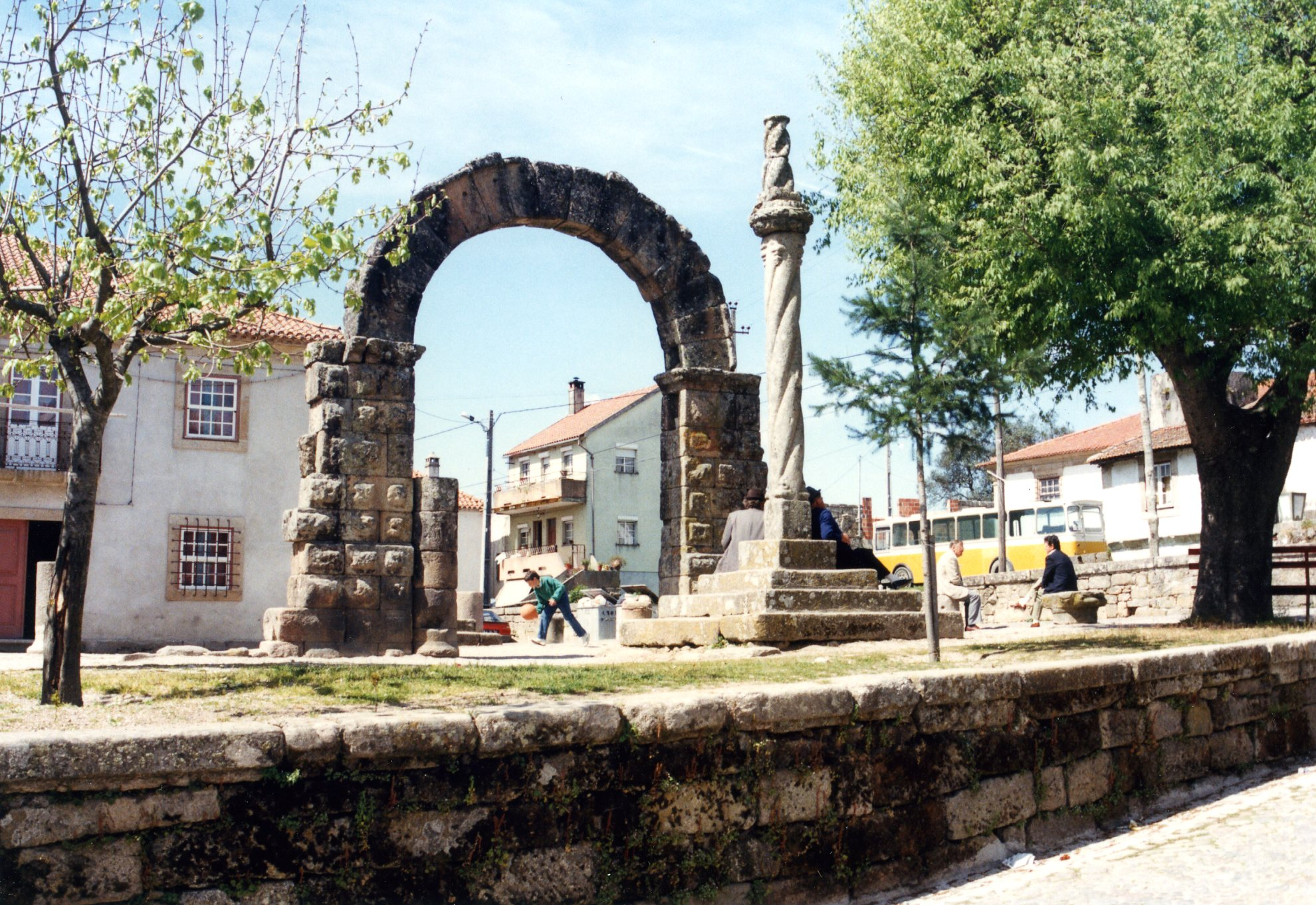 Ruínas romanas de Bobadela This file was uploaded for Wiki Loves Monuments in Portugal with the unique identifier 70552.